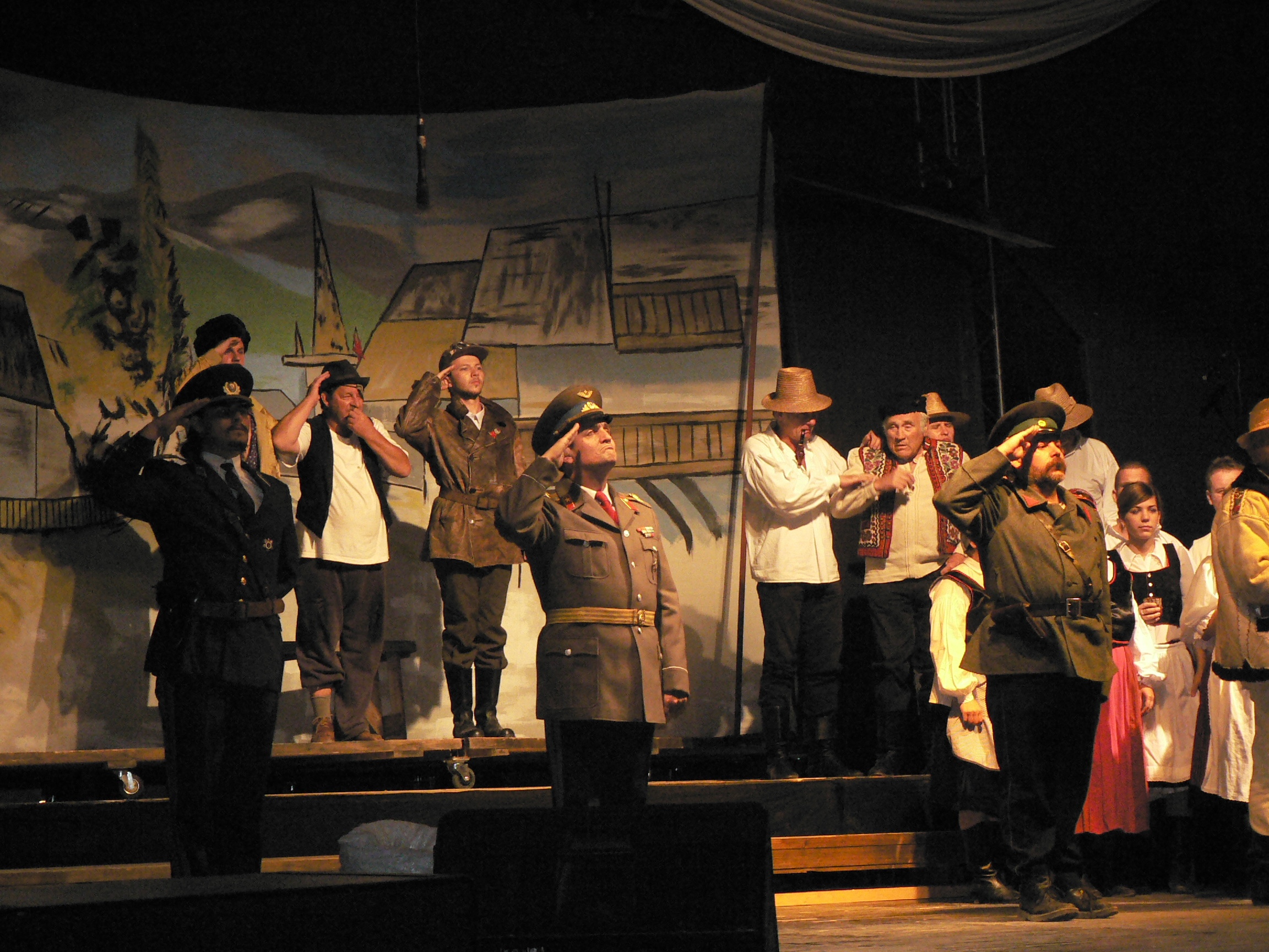 Wass Albert Elvásik a veres csillag című darabjának előadása Pilisszántón